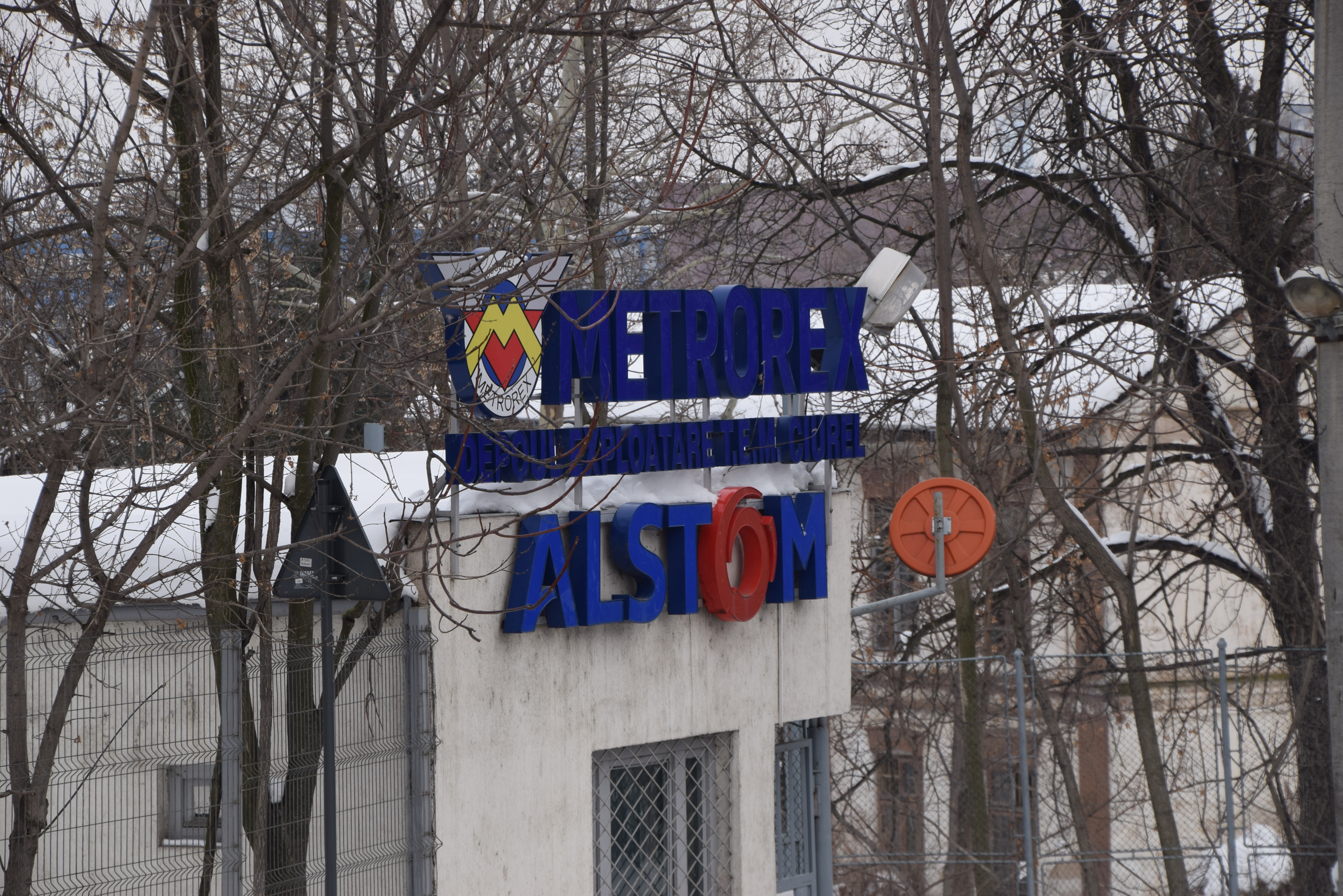 Firma de la intrarea în depoul Ciurel al Metrorex, între 2004-2019 în administrarea Alstom